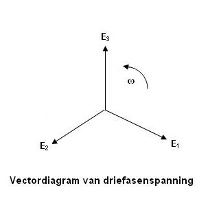 Door auteur opgezet en uitgevoerd vectordiagram, zonder auteursrechten.